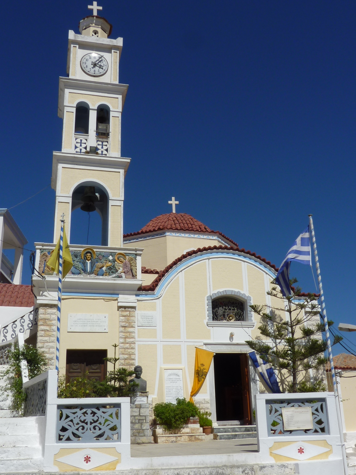 Kirche Kimisi tis Panagios in Olymbos, Karpathos, Griechenland